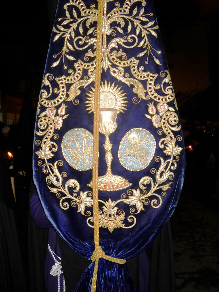 Escudo que aparece en el Bacalao del Divino Perdón